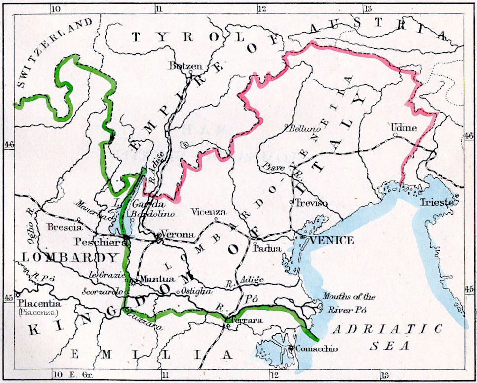 Mappa che illustra il trattato del 3 ottobre 1866 tra Austra e Italia